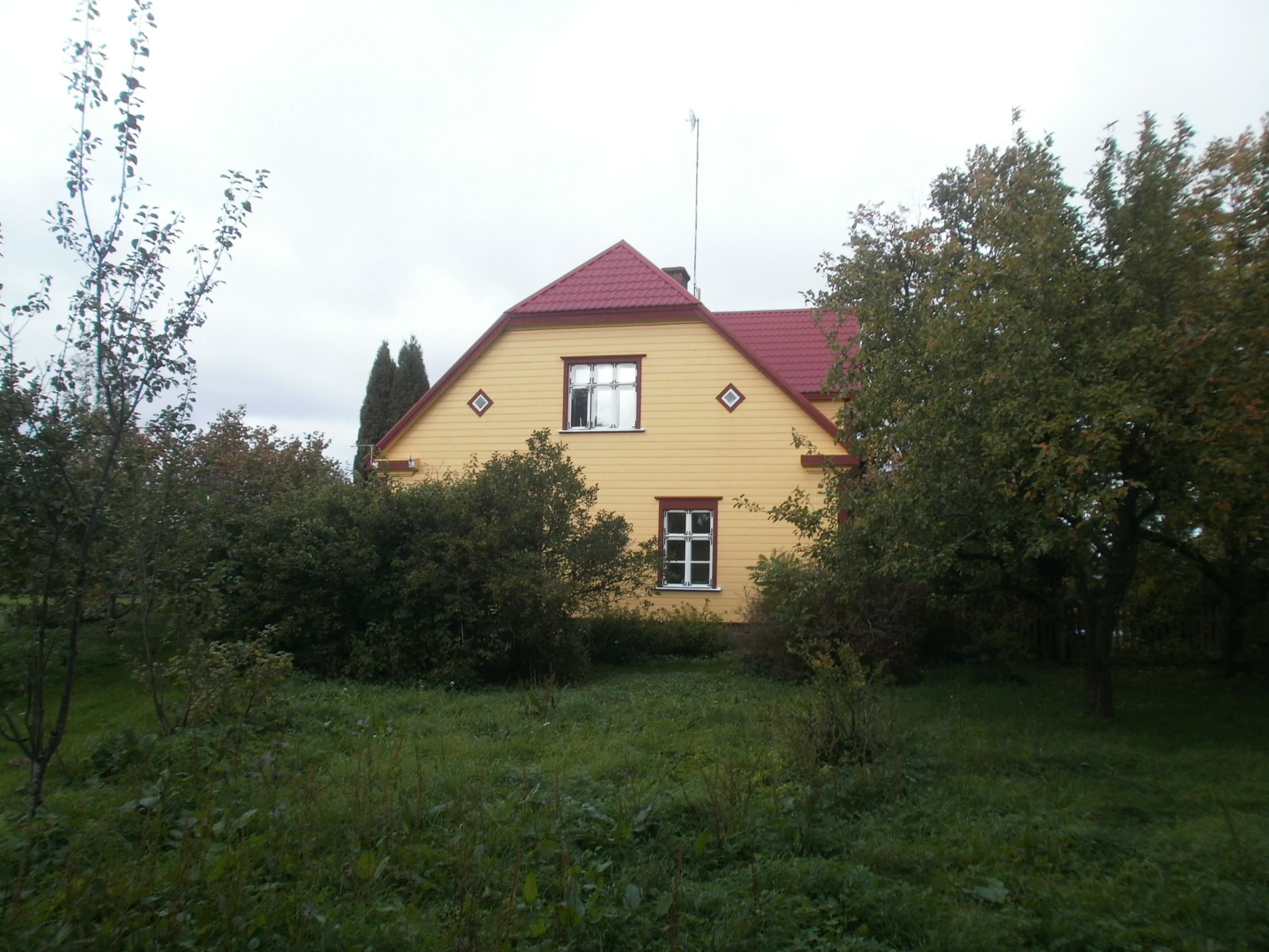 Vaade otsaseinale kagust.